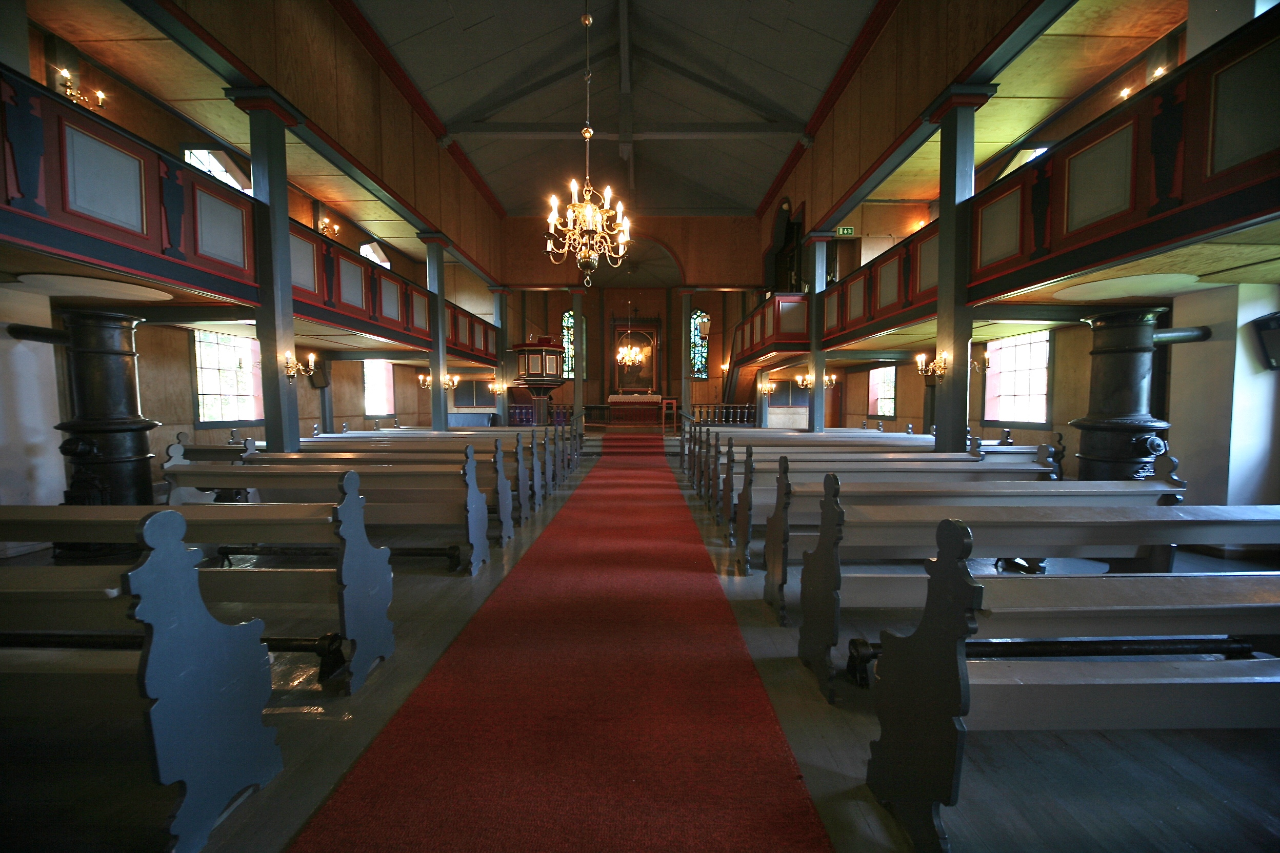 Gulen Kirke